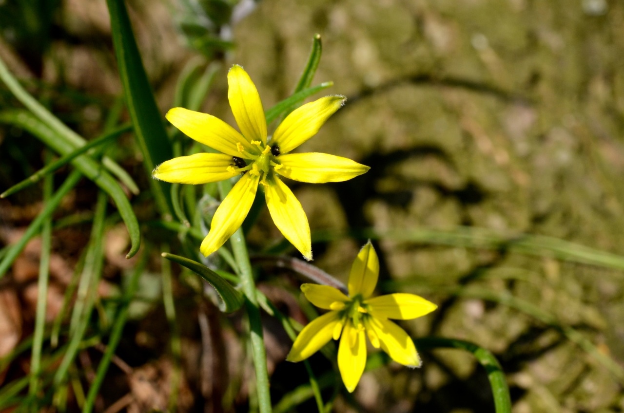 Gagea lutea